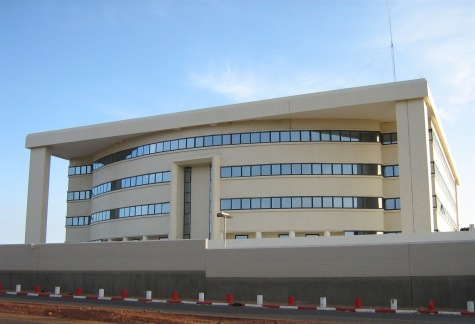 bissau